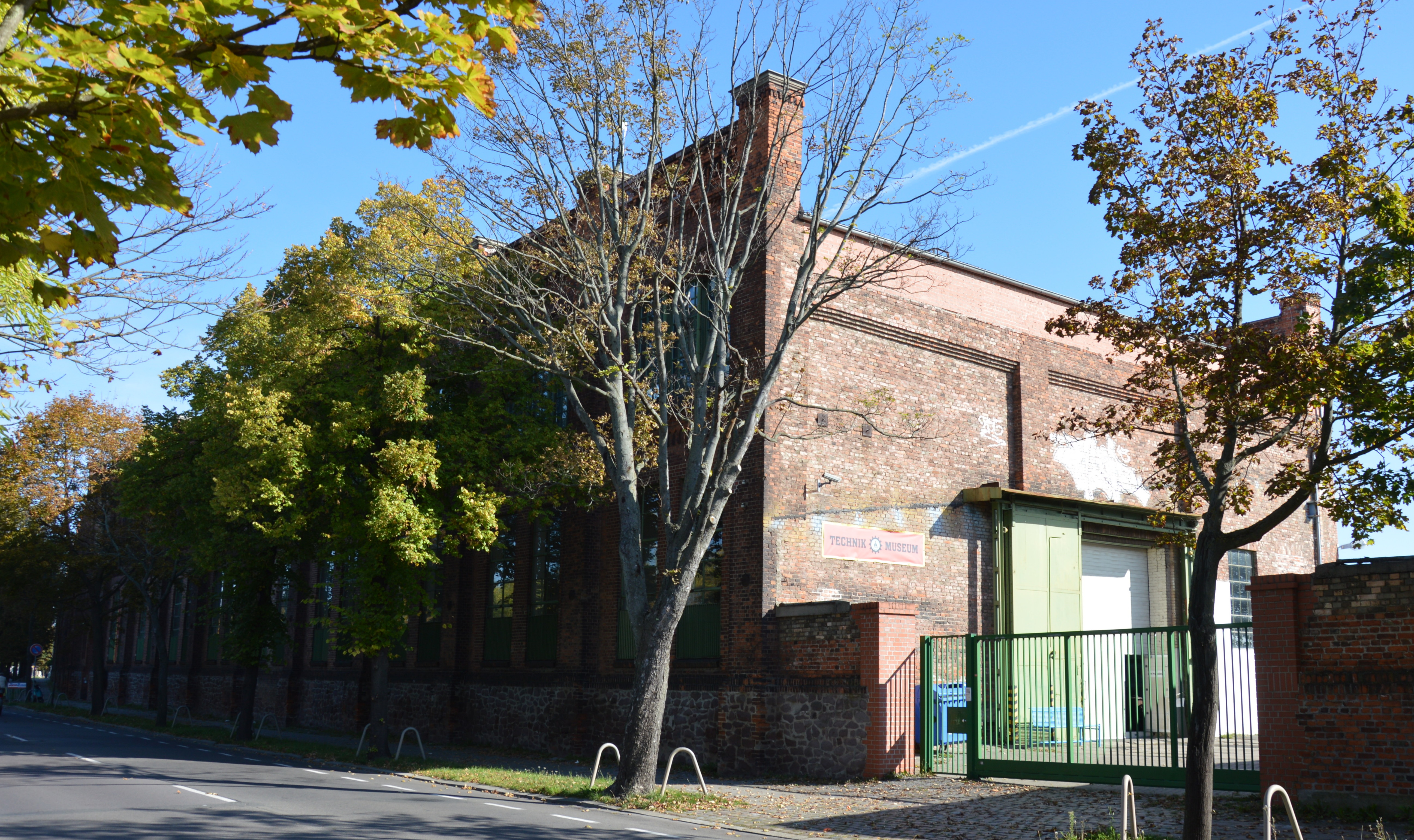 Technikmuseum Magdeburg 2015, Dodendorfer Straße 65; ehemalige Werkhalle (gebaut 1871–1888), Panzergießerei des Krupp-Gruson-Werks, später Stahlbauhalle des Schwermaschinenbau-Kombinats „Ernst Thälmann“ (SKET)